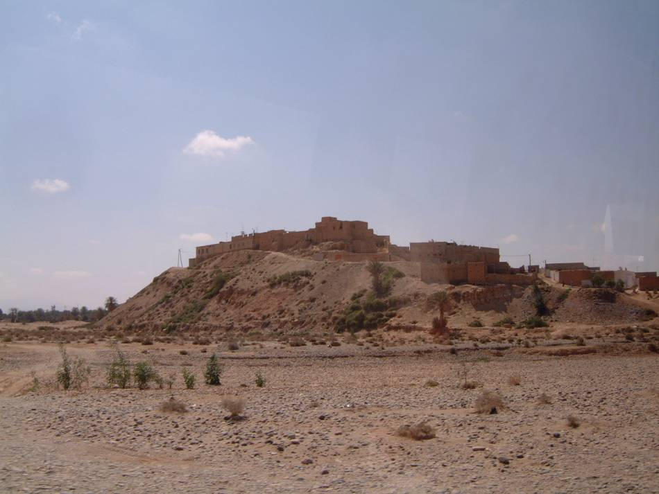 Village de Freija vers Taroudant au Maroc